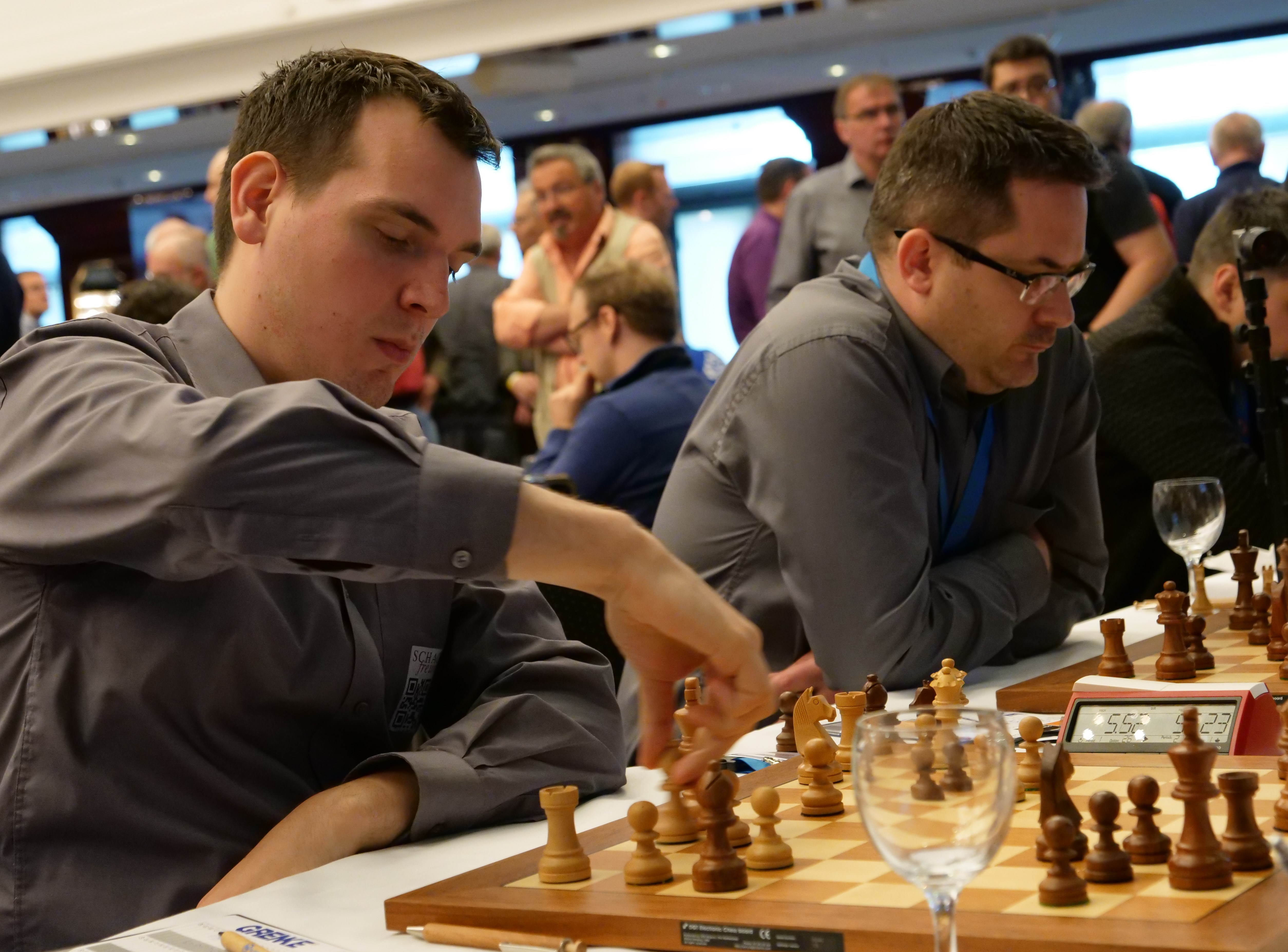 Piorun und Mista Bundesliga-Finalrunde 30-4-2018